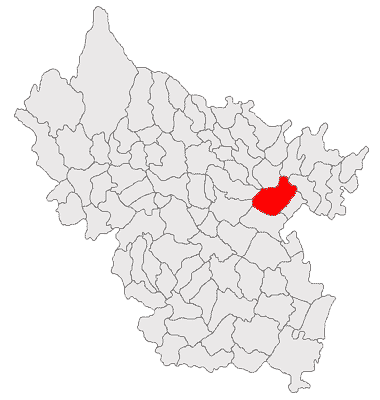 Categorie:Hărţi ale judeţului Buzău